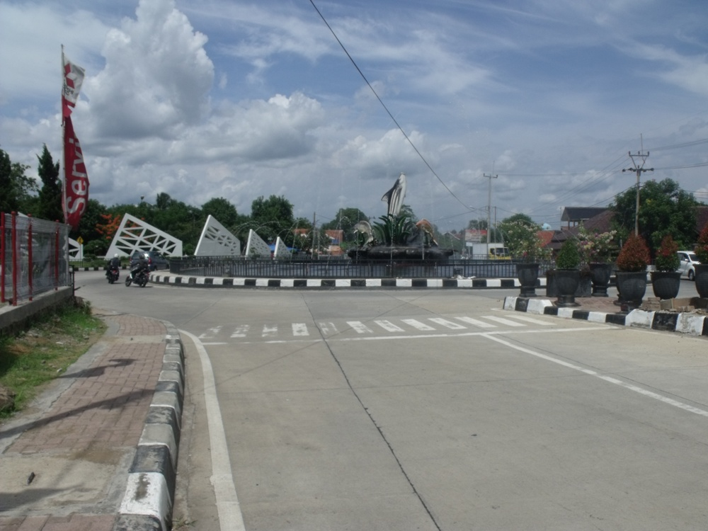 Jl KH Abdul Halim, Kecamatan Majalengka, Kabupaten Majalengka, Jawa Barat-Indonesia